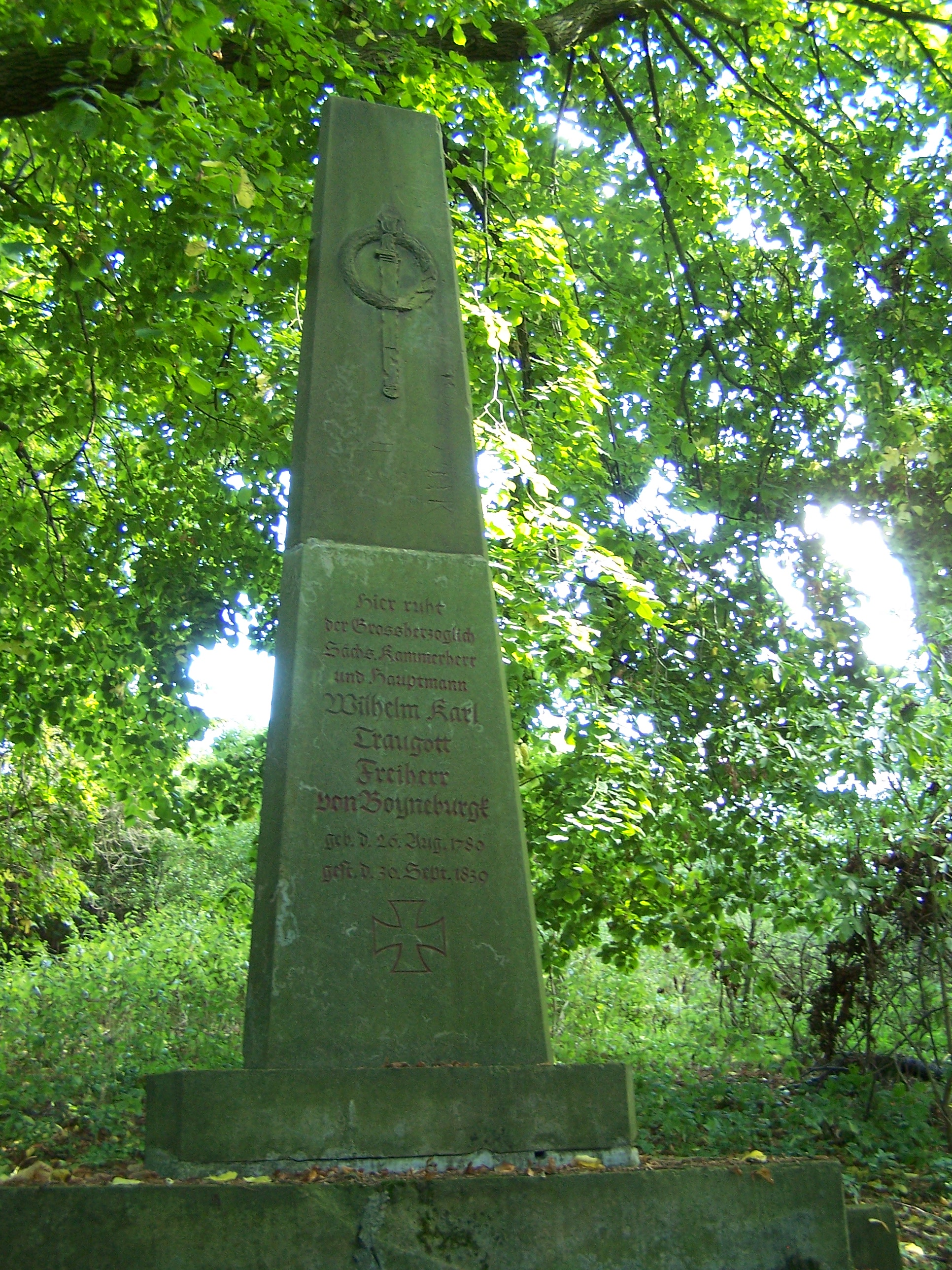 Das wieder aufgebaute Boyneburgk-Denkmal auf dem Hörschelberg markiert die Grenze zwischen Krauthausen, OT Deubachshof, und dem Stadtteil Hörschel der Stadt Eisenach.